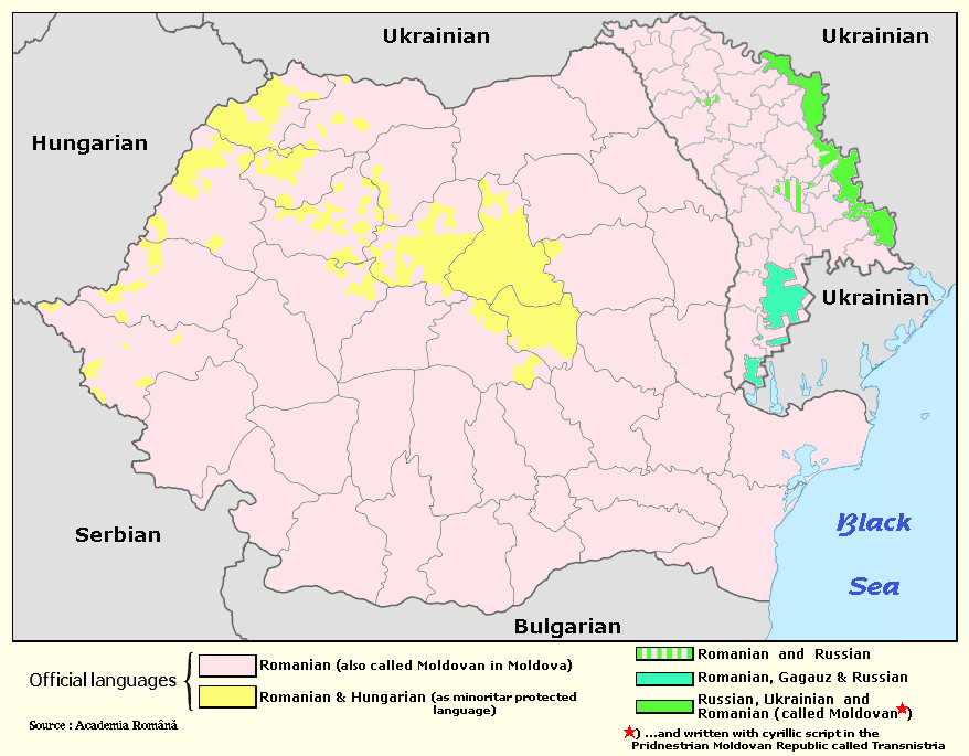 Le roumain en tant que langue officielle, d'après l'académie roumaine. Romanian as an official language, since Academia Românä.